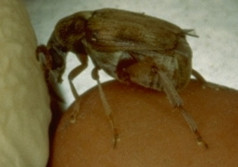 Male Callosobruchus maculatus